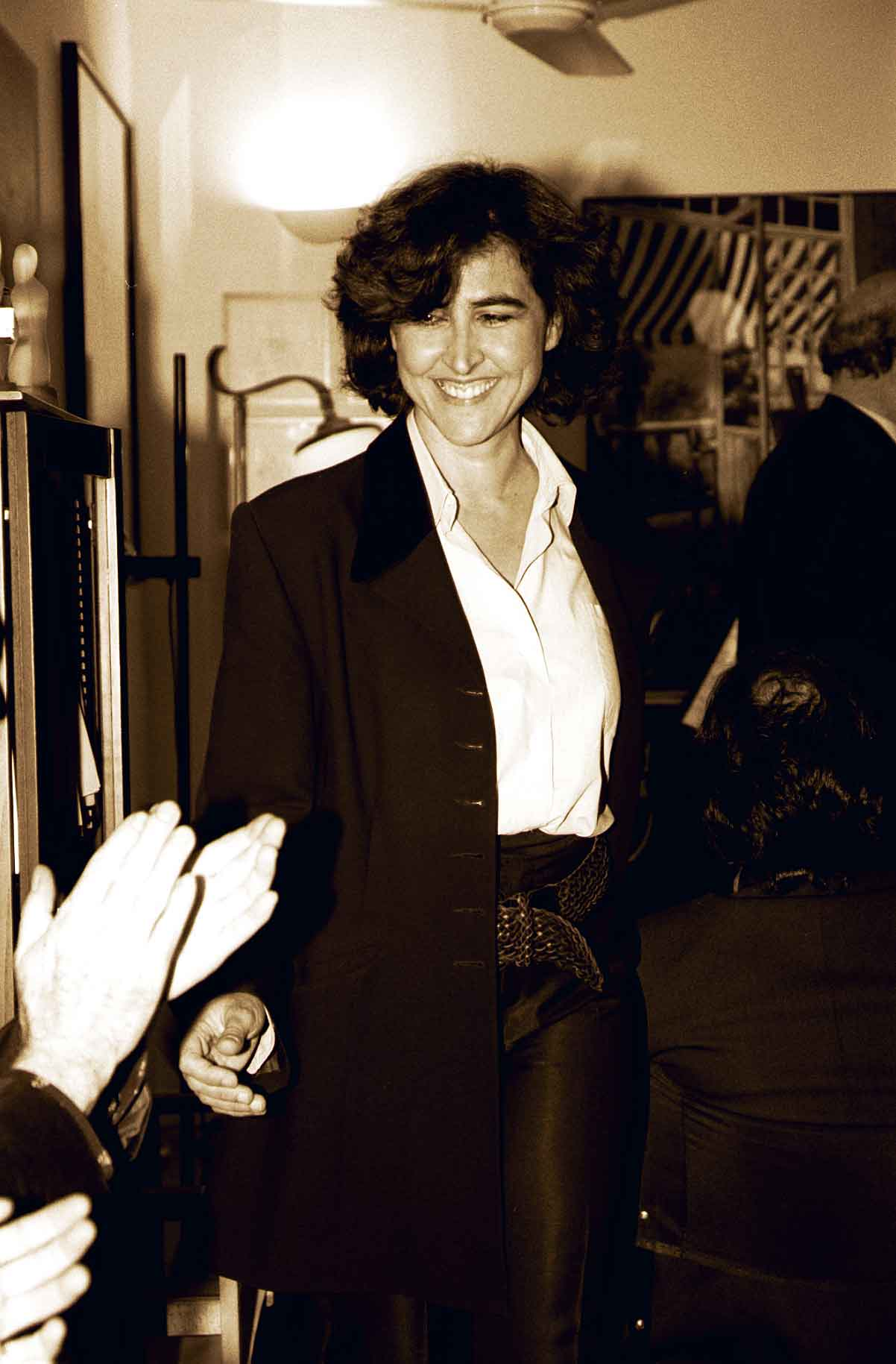 Esta foto no tiene copyright